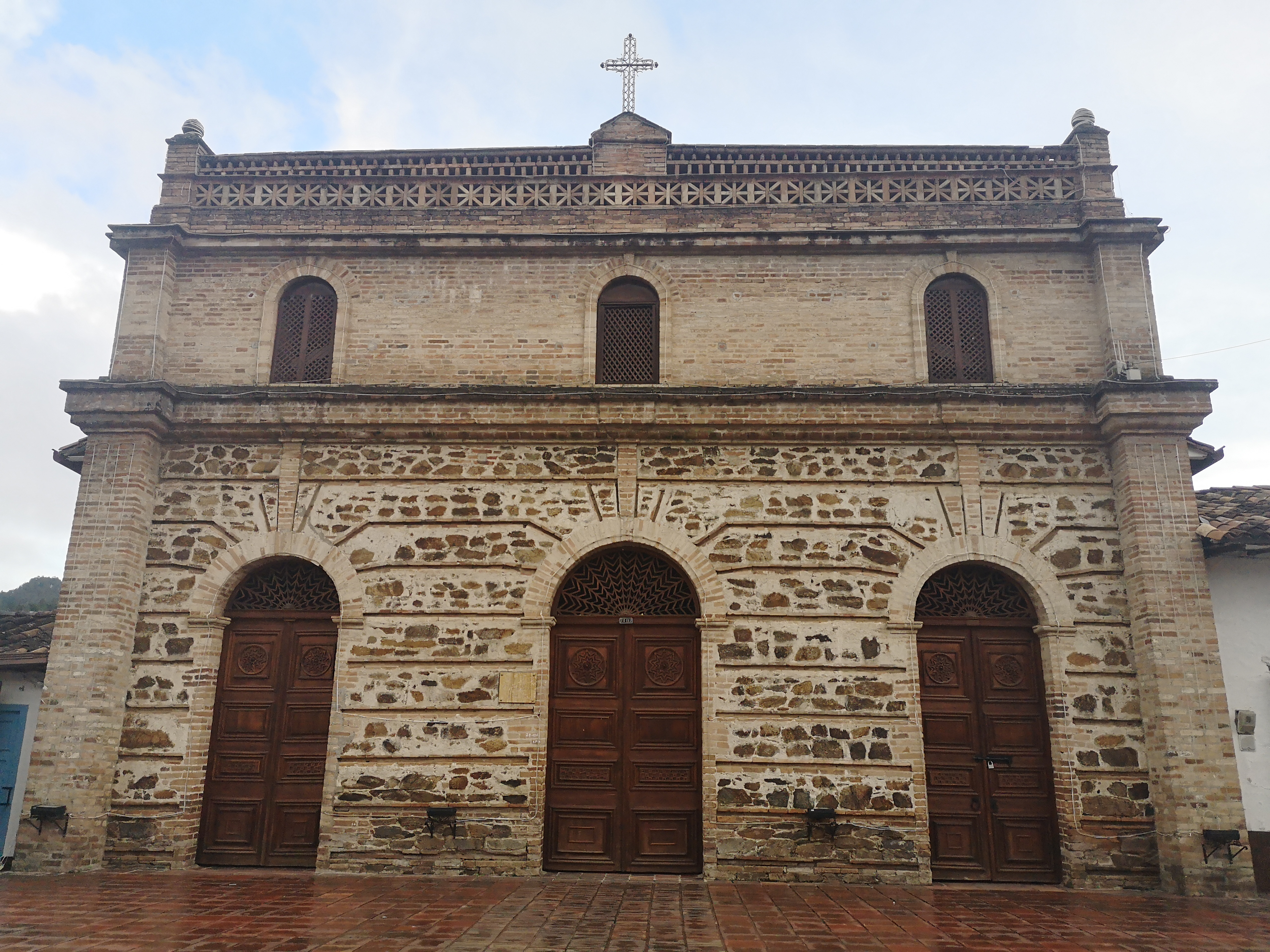 Fachada de la Capilla de Nuestra Señora de los Dolores y San José, El Retiro